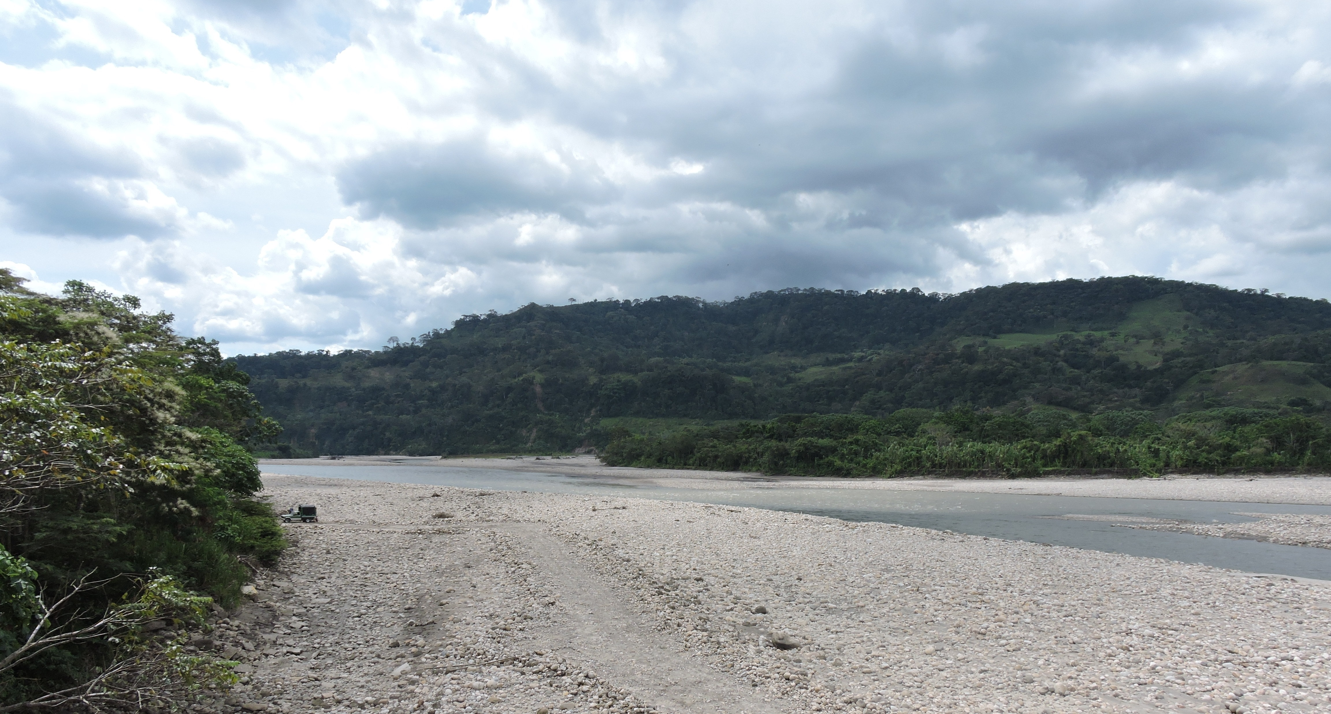 Río en Barranca de Upia Esta fotografía fue tomada en el municipio colombiano con código 50110.